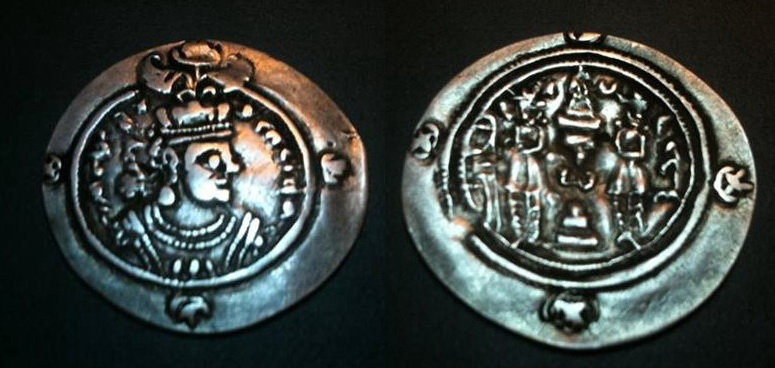 سکه یزدگردسوم (بدون ریش)ضرب سکستان